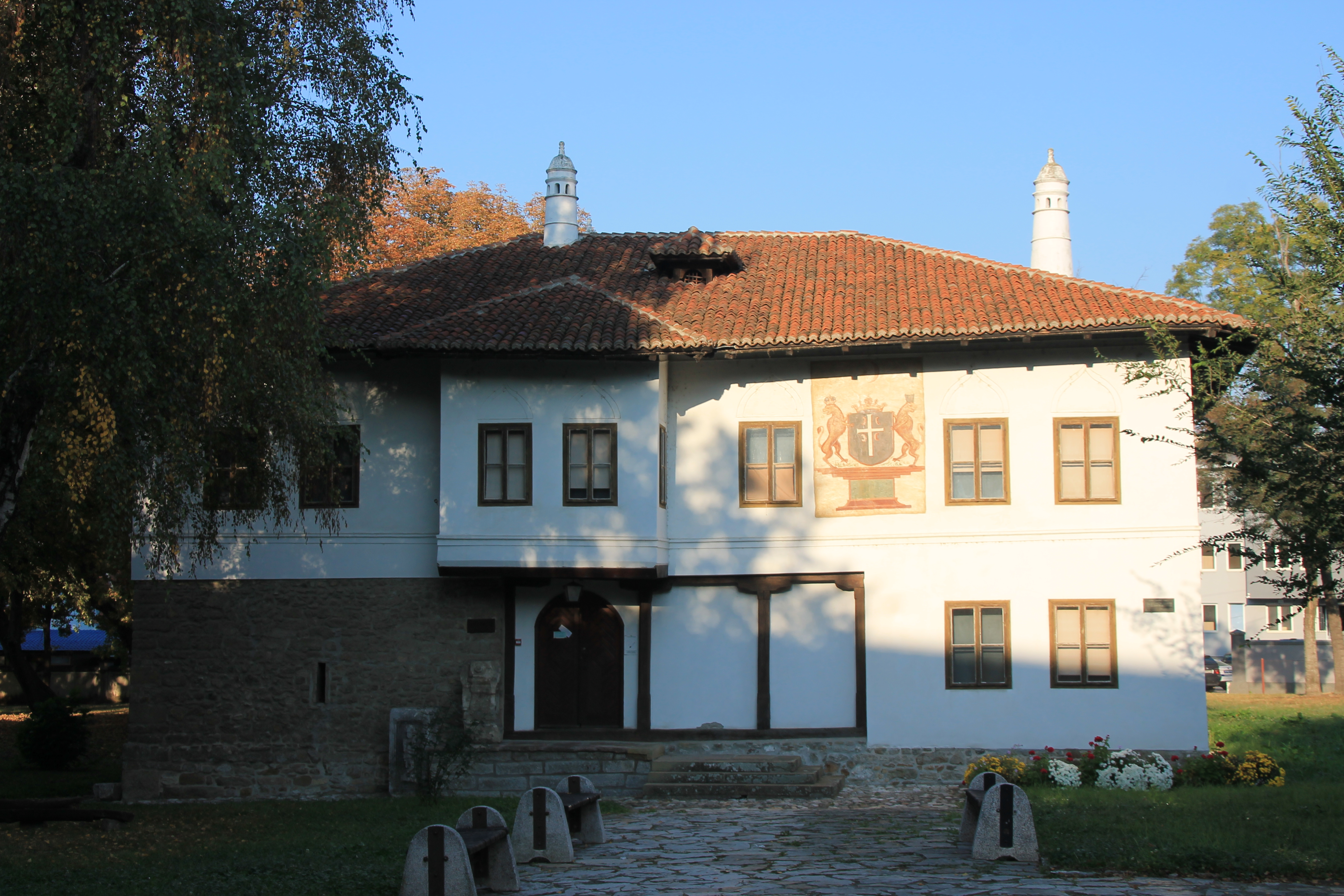 Gospodar Jovanov konak